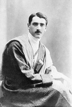 ქართველი მათემატიკოსის, გიორგი ნიკოლაძის ფოტოსურათი.